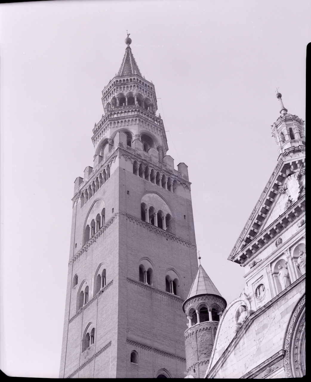 Servizio fotografico : Cremona, 1965 / Paolo Monti. - Buste: 3, Fototipi: 3 : Negativo b/n, gelatina bromuro d'argento/ pellicola ; 10x12. - ((Serie costituita da 3 negativi identificati con i nn.:10646-10648. Sulle buste iscrizioni manoscritte. La suddetta serie è contenuta nella scatola identificata con la numerazione G10501-11000. - Occasione: Documentazione per la pubblicazione: "Emilio CECCHI, Natalino SAPEGNO (a cura di), Storia della Letteratura Italiana, 9 voll., Milano, Garzanti, 1966 e segg.". - Fonte: Agenda di Paolo Monti: Monti/ 2/ 6 giugno 1964 - 31 marzo 1966/ 8194-12420 (1964-1966), presso Archivio Paolo Monti